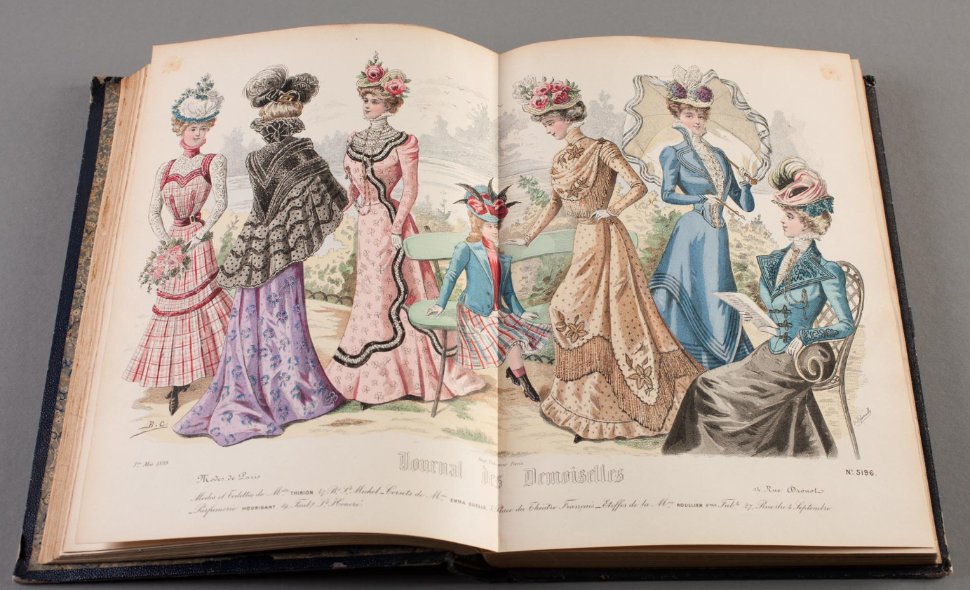 Hermine von Parish dokumentierte die Entwicklung der Pariser Mode, in dem sie Unterhaltungsblätter wie das Journal des Desmoiselles von 1899 in ihre Sammlung einfügte.